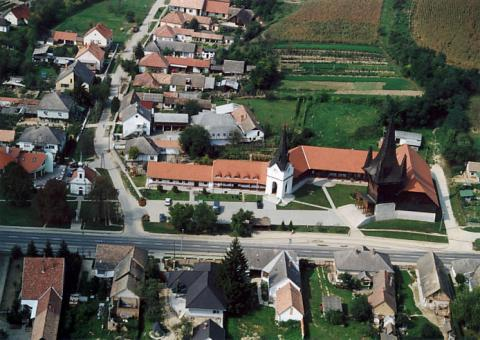 Kakasd, Hungary, aerialphotography